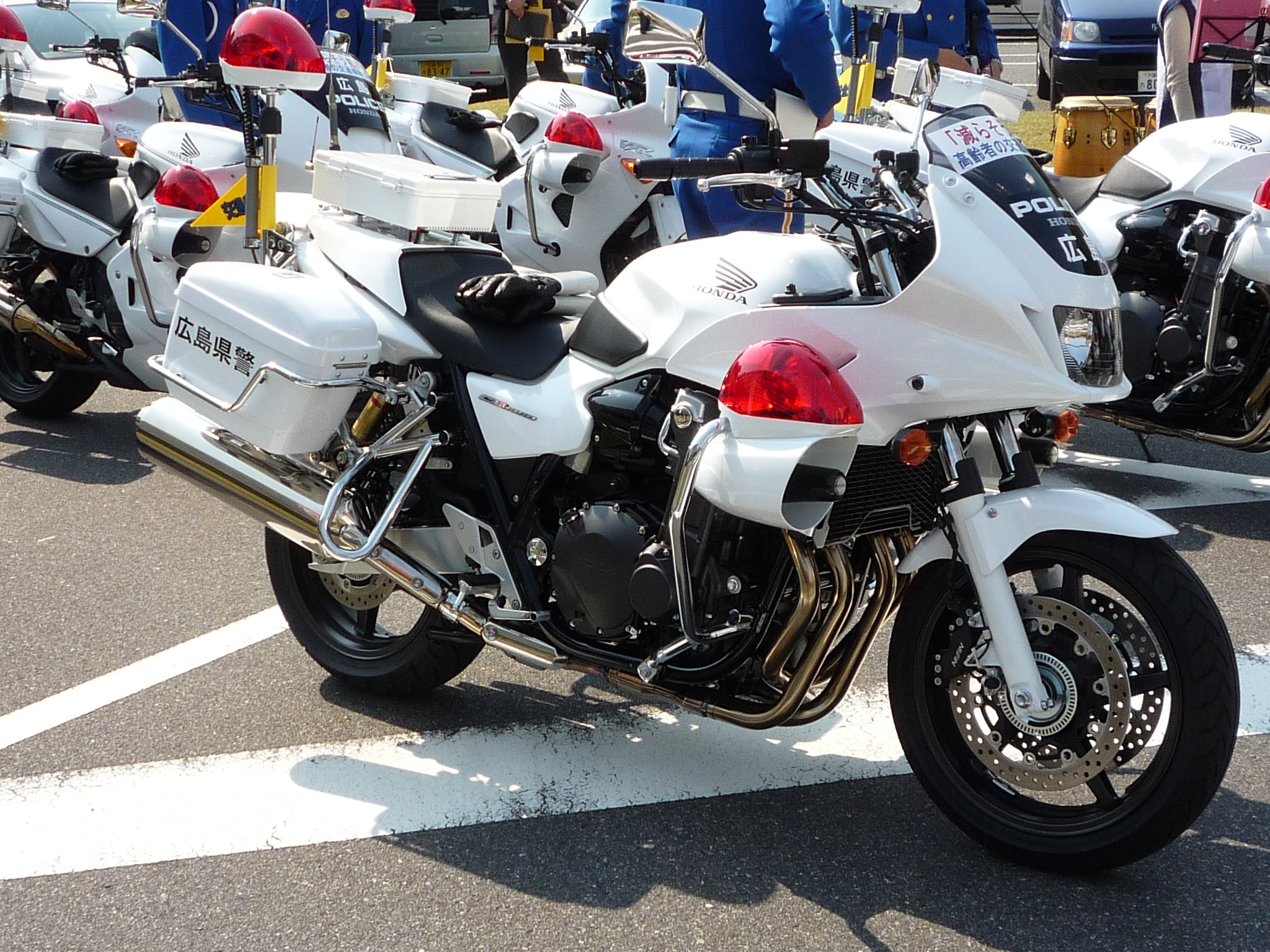 広島県警交通安全運動出発式